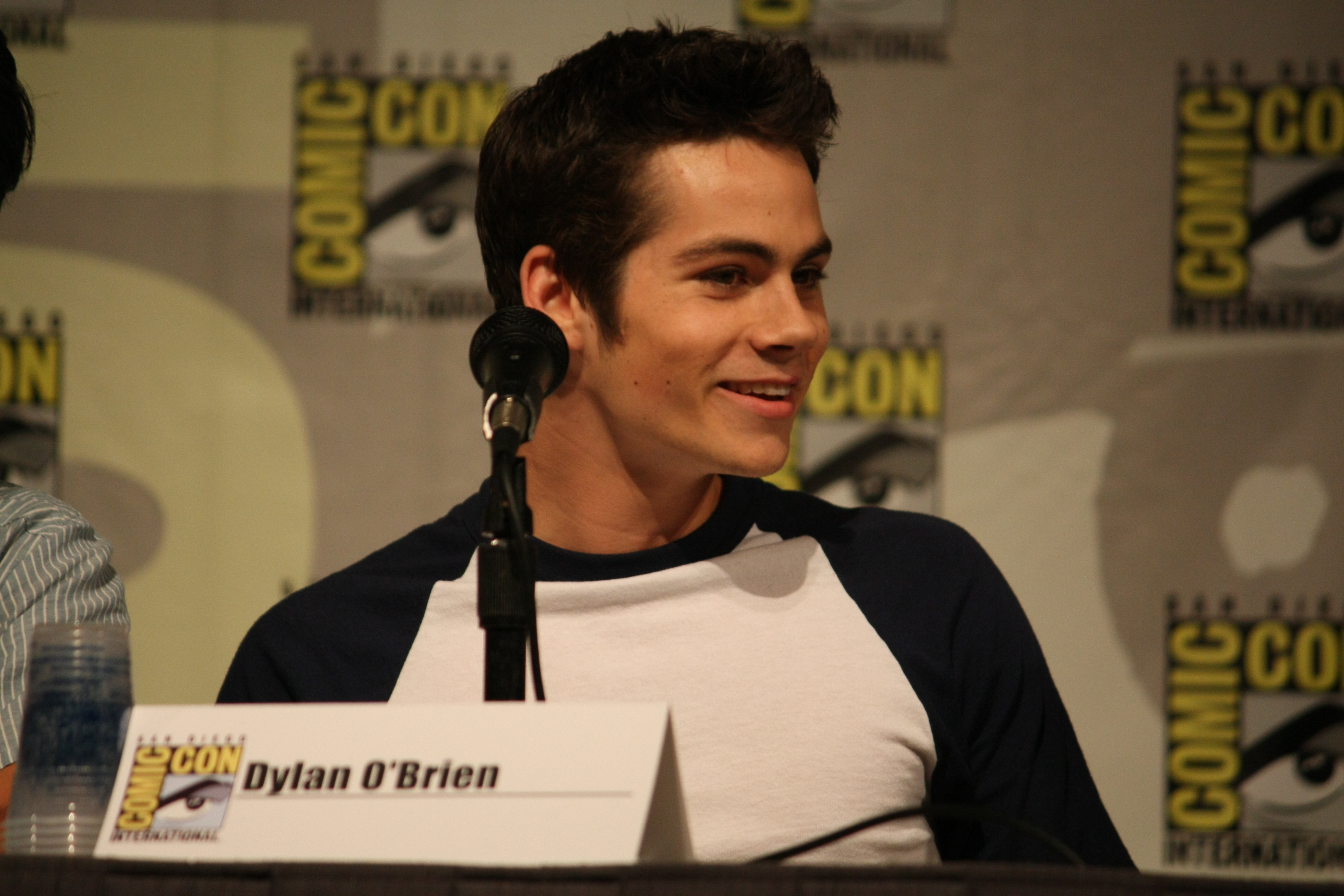 Dylan O'Brien (Stiles)